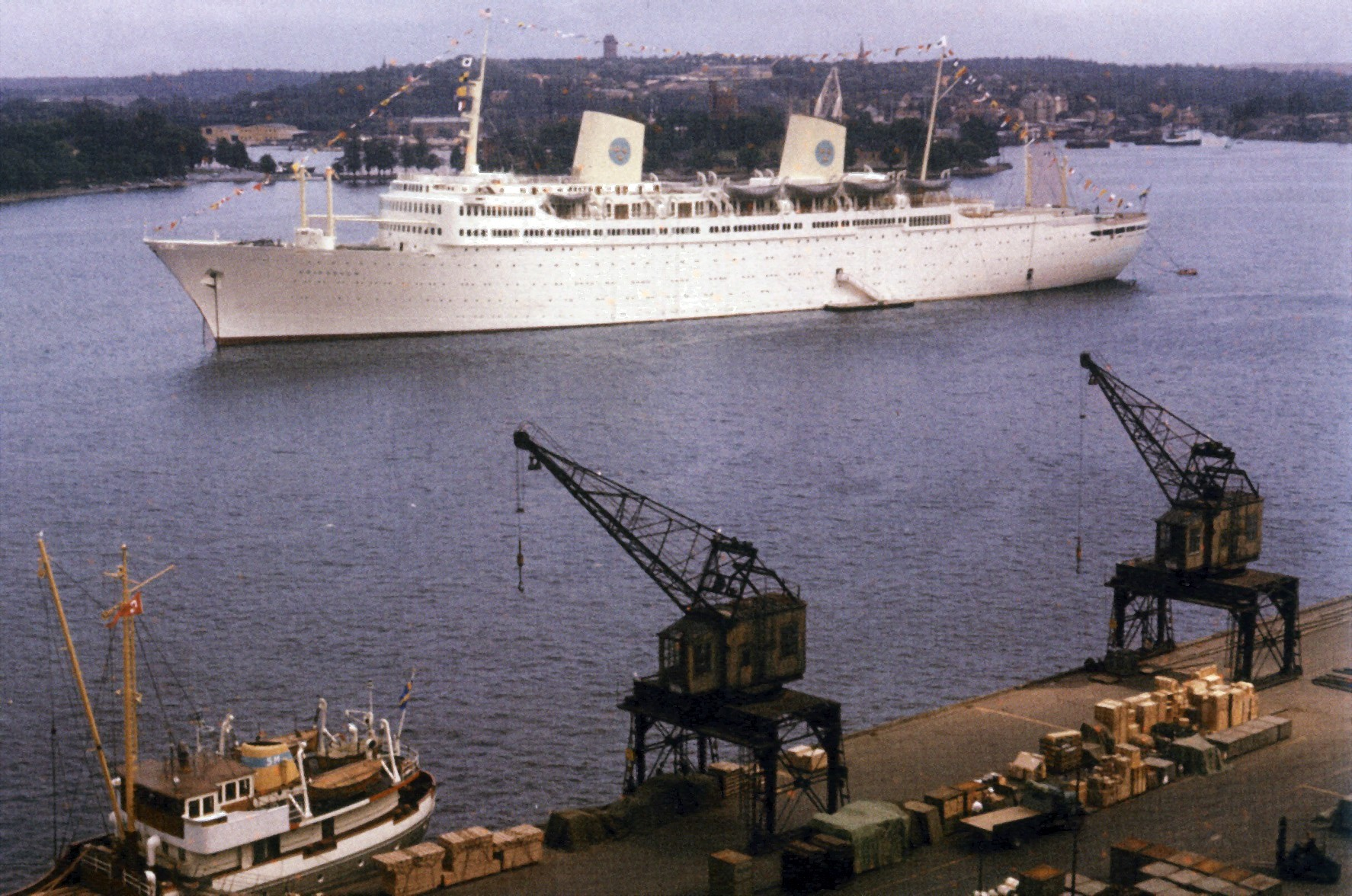 M/S Gripsholm med Stadsgårdskajen i Stockholm 1958